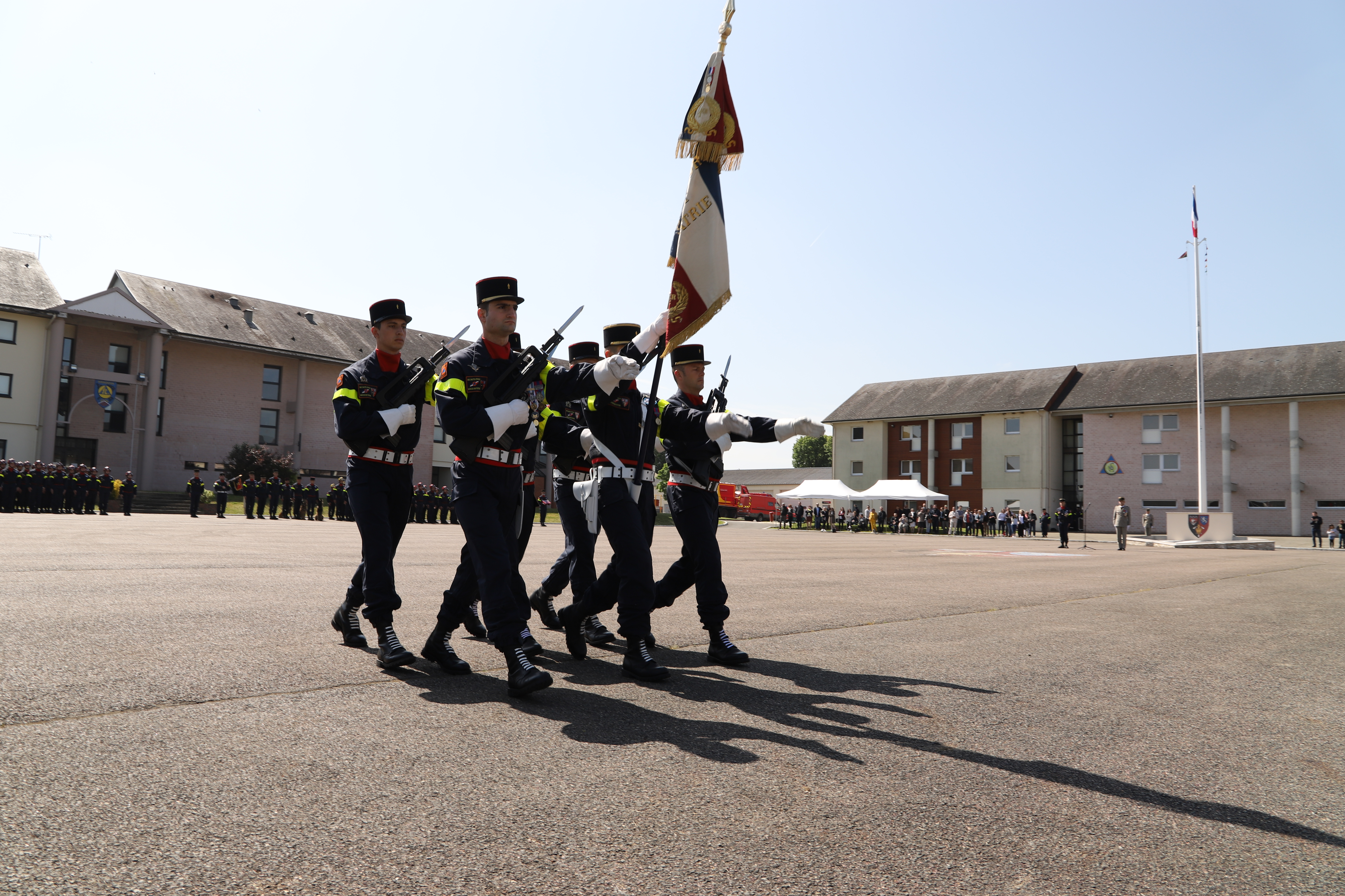 Prise d'armes à l'UIISC1